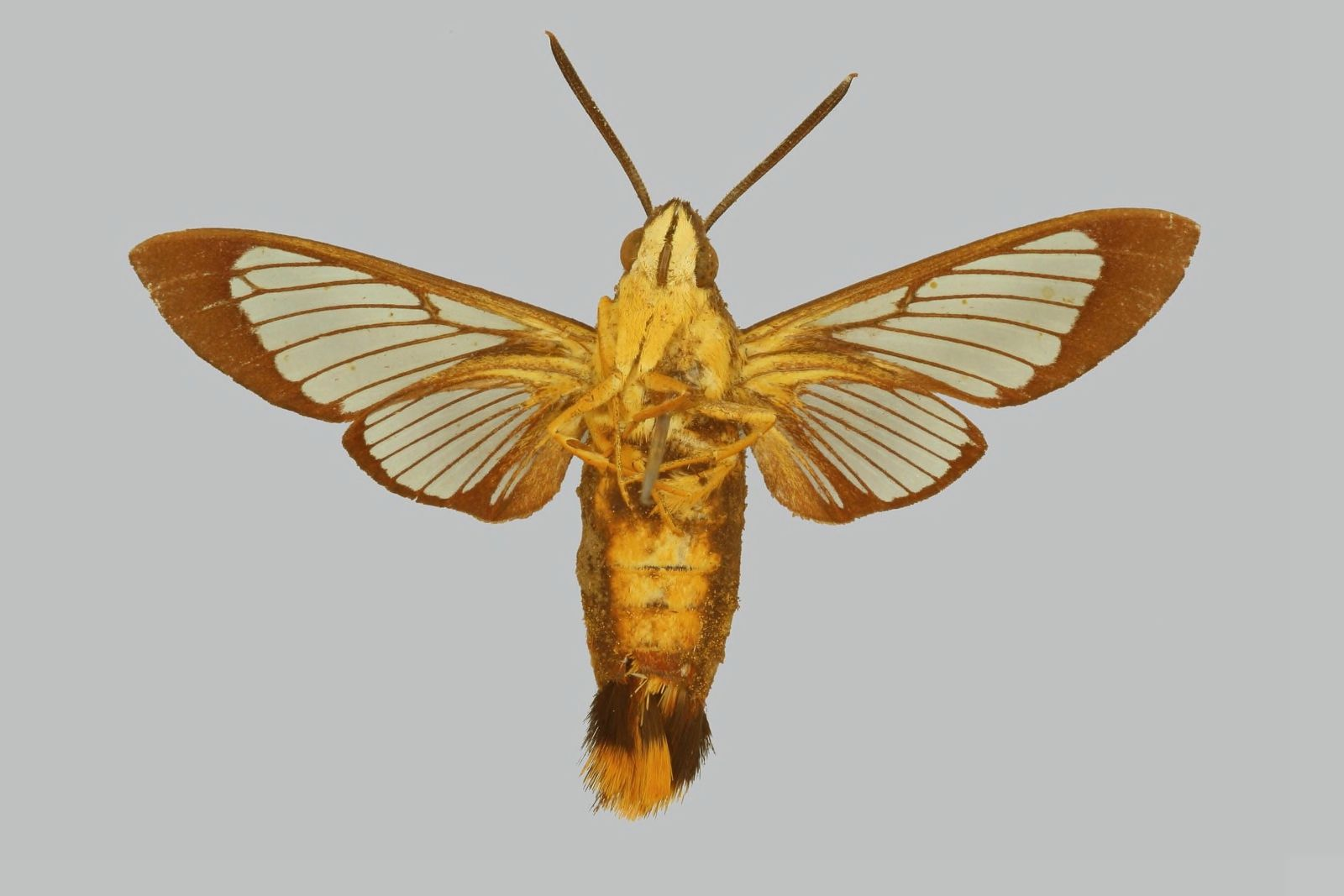 Hemaris venata Male underside